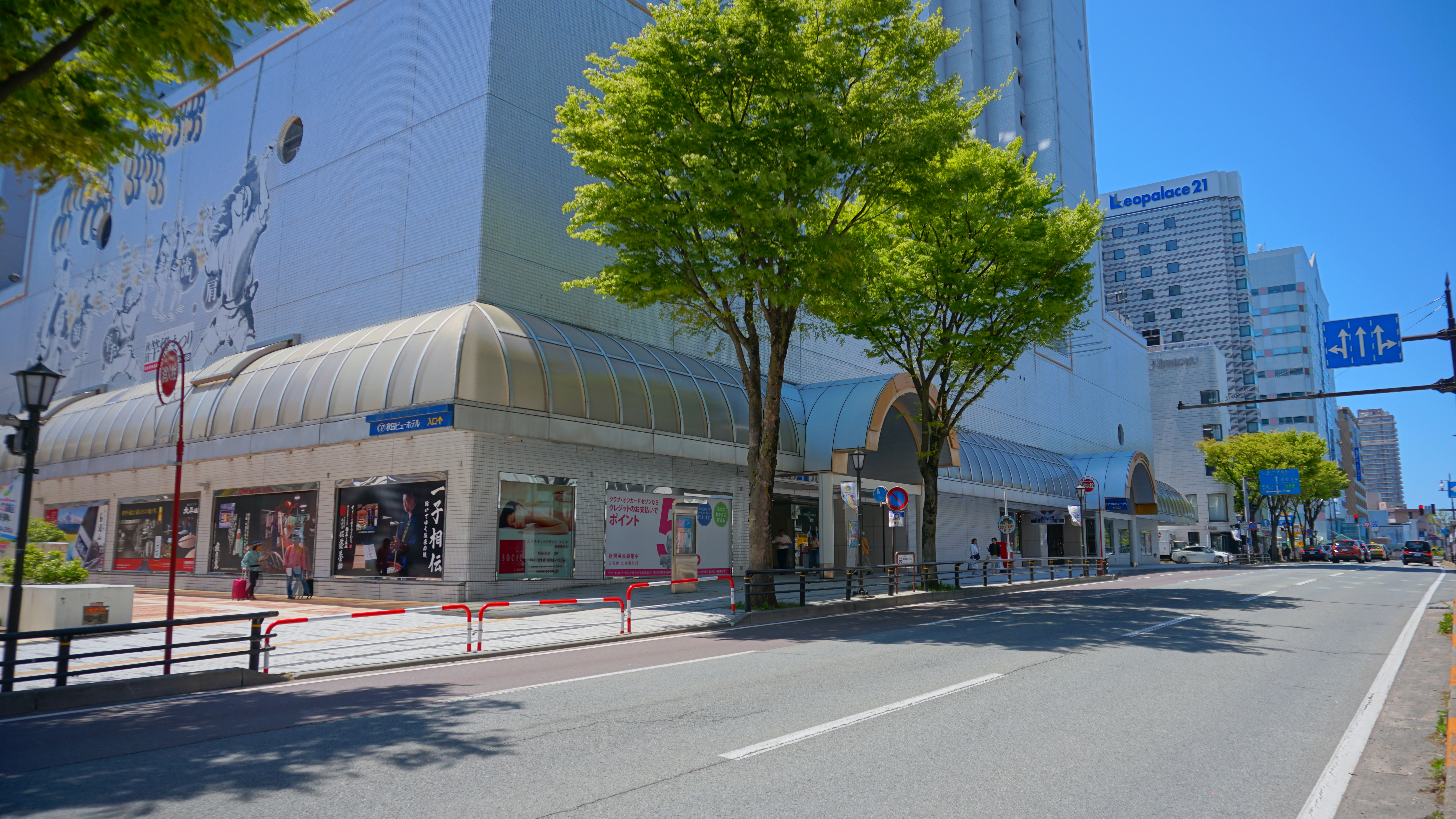 秋田市広小路、秋田西武前にて